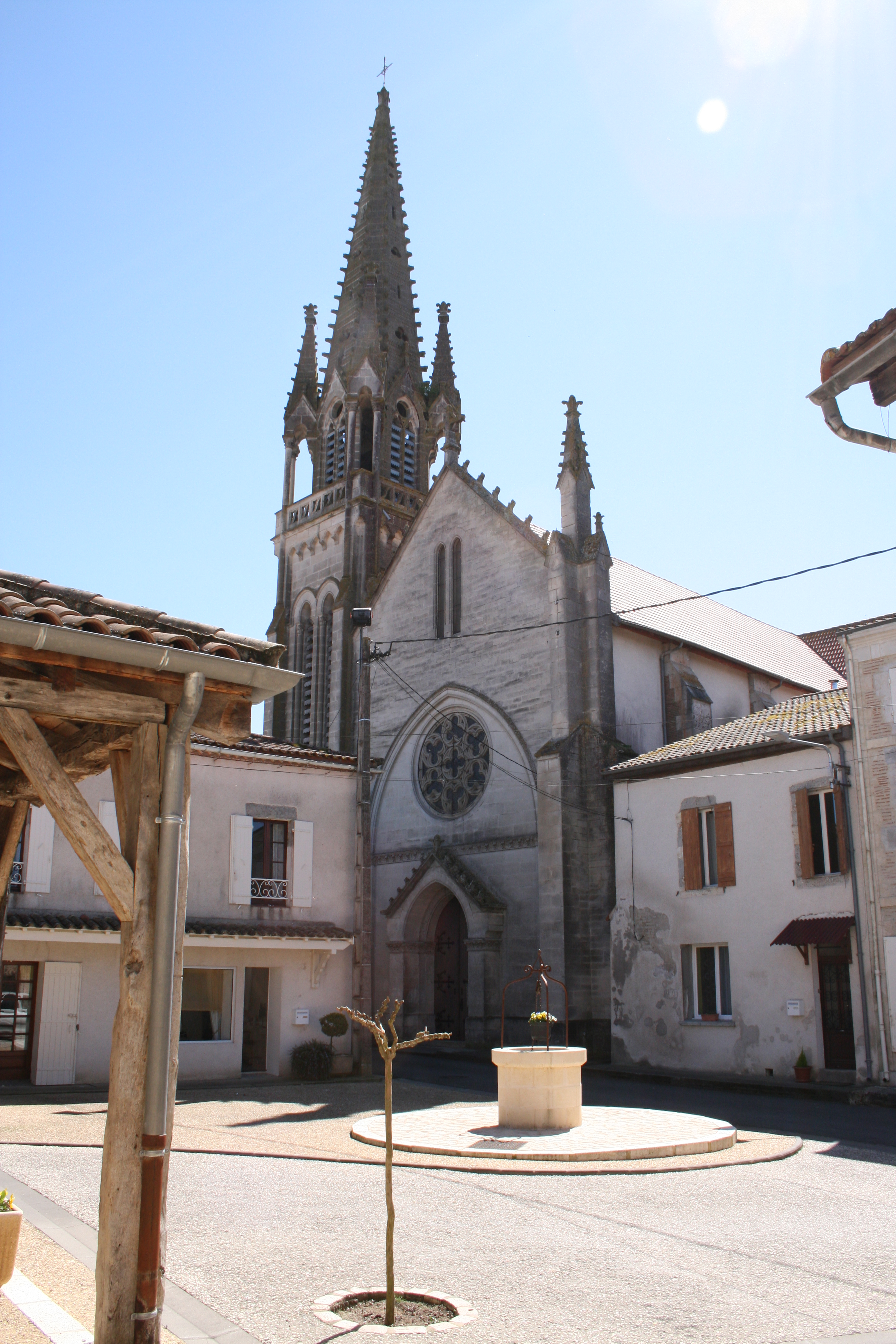 پښتو: Vue du centre de Puch-d'Agenais